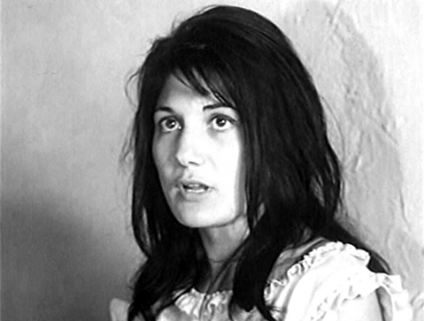 Accattone